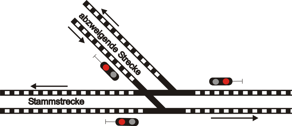 Schema einer zweigleisigen Abzweigstelle